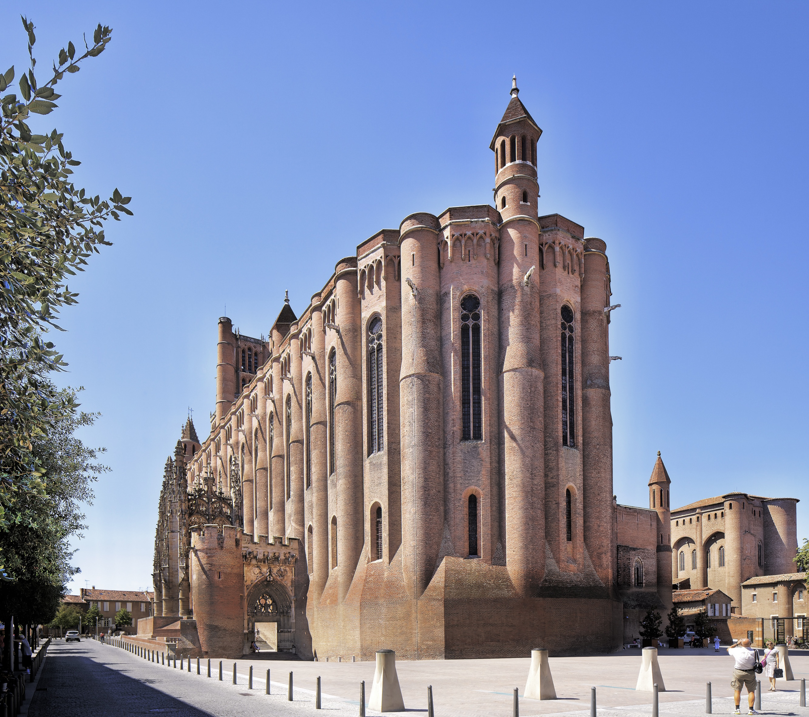 Cathédrale Sainte Cécile, Albi.